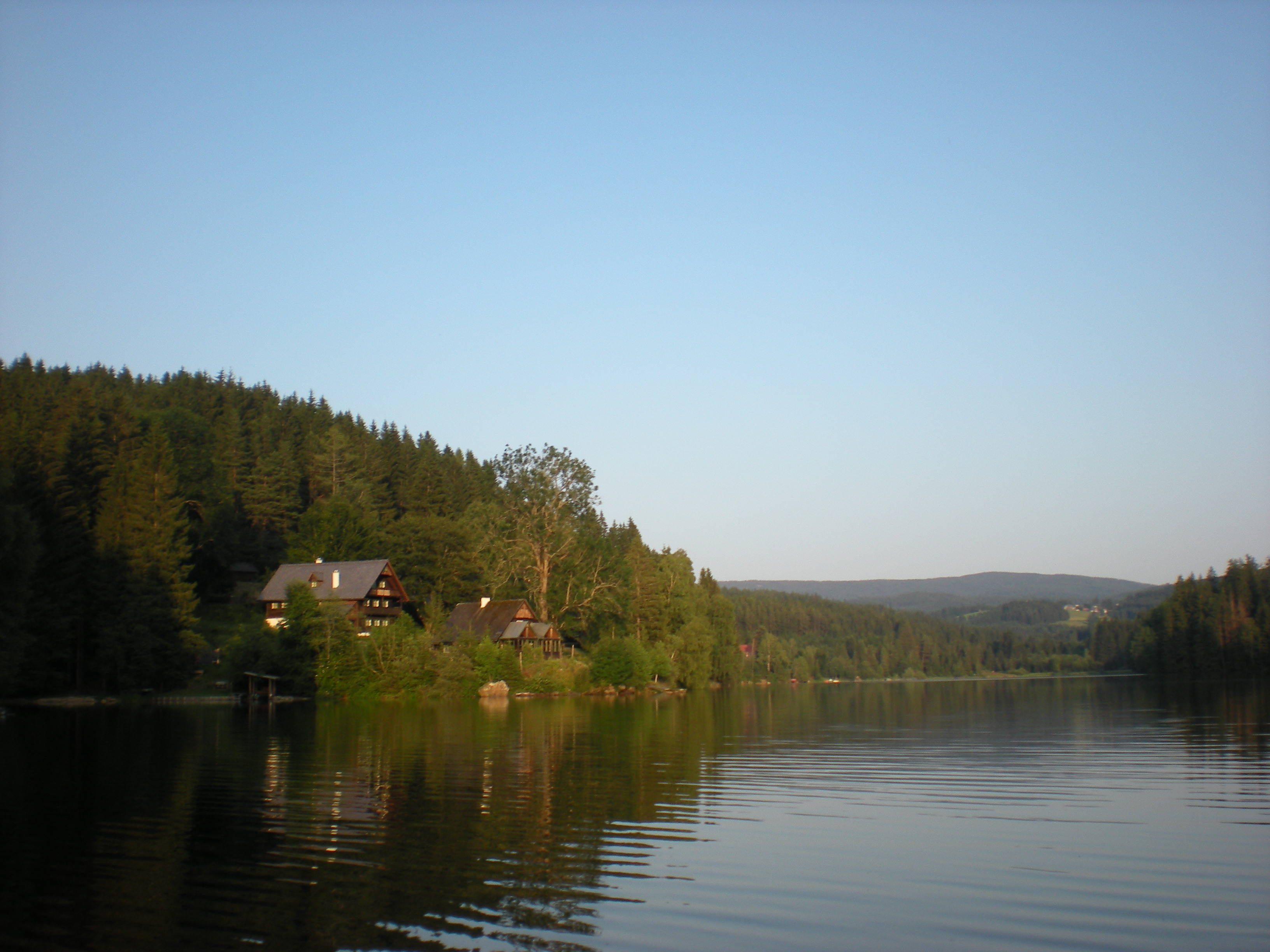 Packer Stausee: Blick vom Nordufer nach Westen